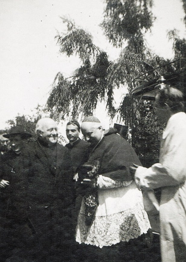 Louis Duchesne et le cardinal de la curie romaine Francesco di Paola Cassetta (1841-1919), collection Marie-Anne Miniac (Rennes, France).